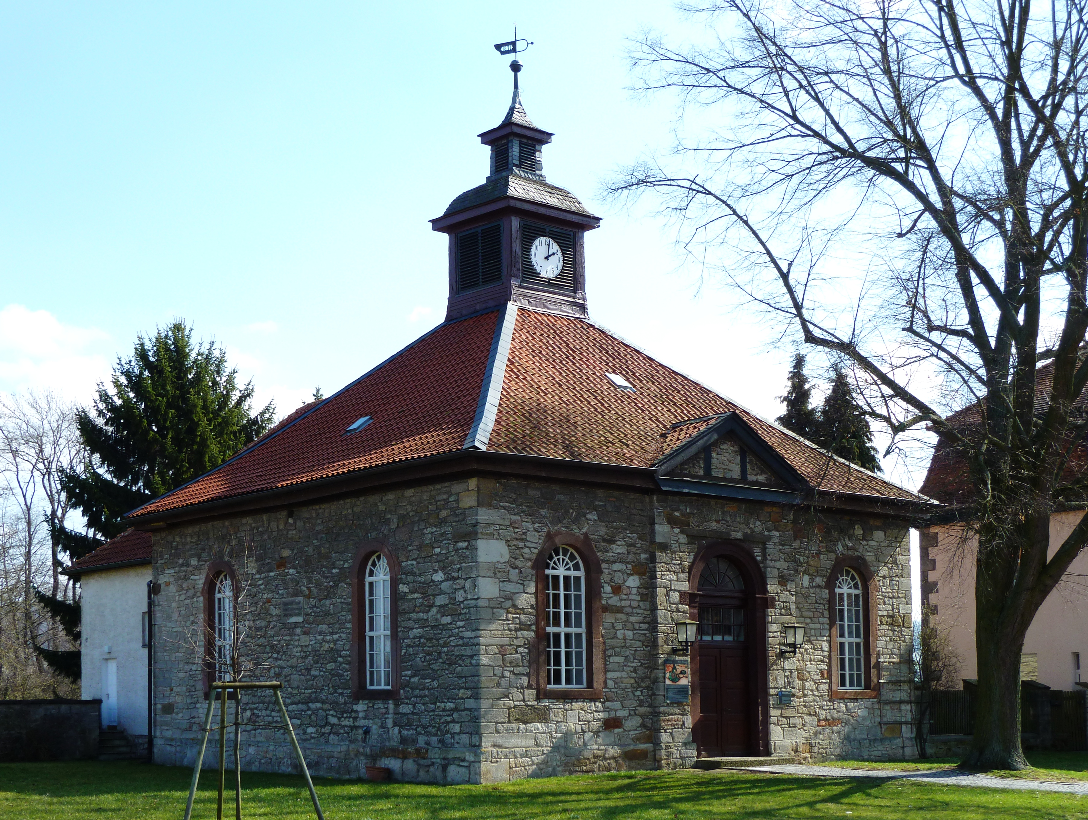 Evangelische Kirche St. Marien in Höckelheim, Stadt Northeim, Niedersachsen